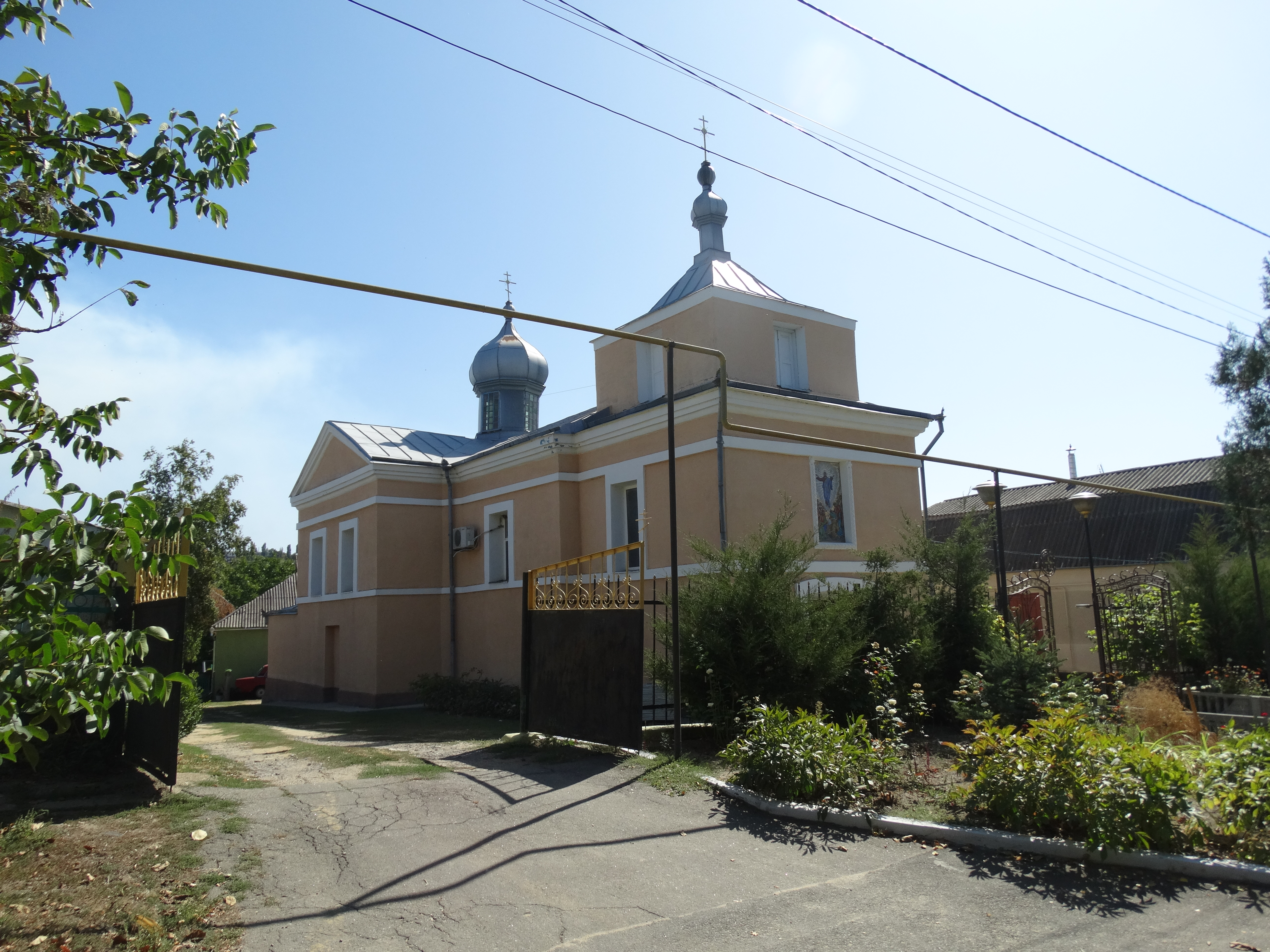 Вознесенська церква у смт Окни, Одеська область. Вікіекспедиція на північ Одещини